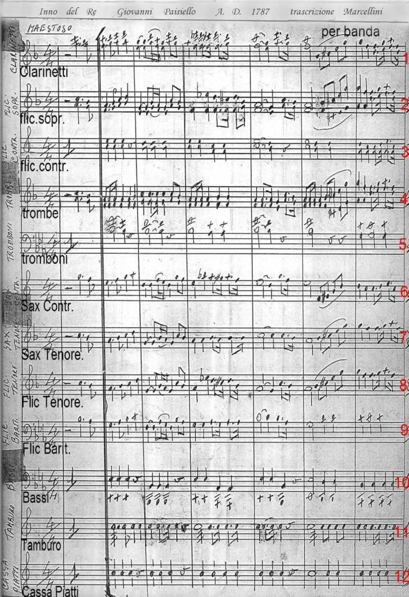 Spartito dell' inno delle due Sicilie